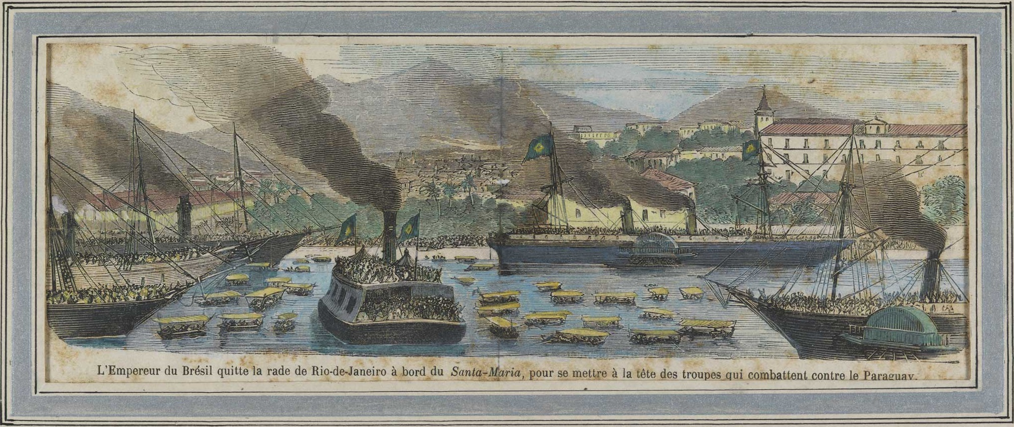 L'Empereur du Brésil quitte la rade de Rio-de-Janeiro à bord du Santa-Maria, pour se mettre à la tête des troupes qui combattent contre le Paraguay.